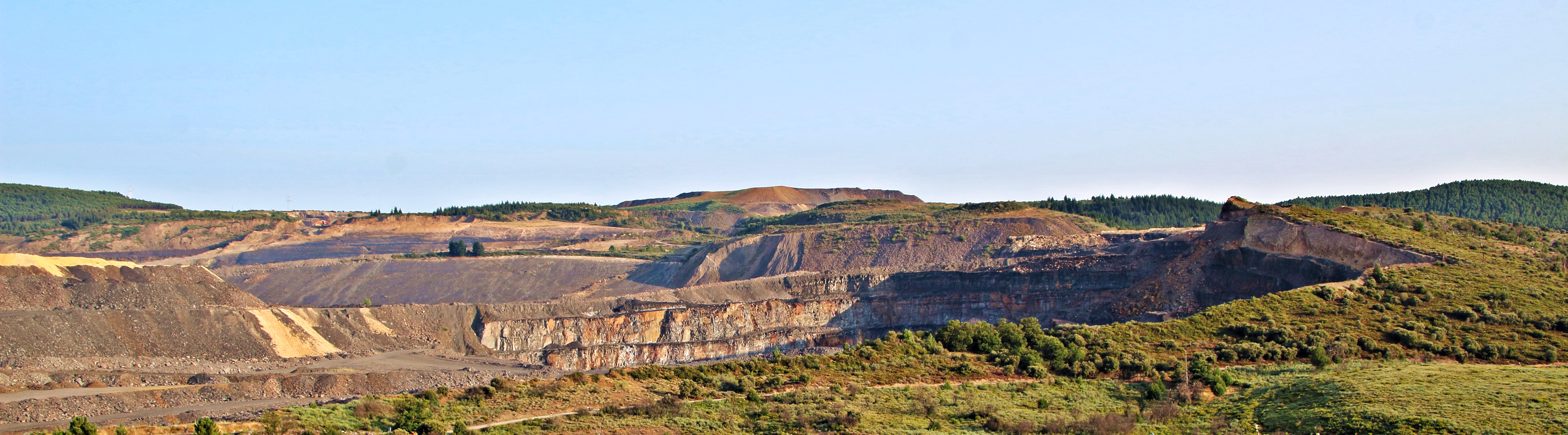 Lillo del Bierzo, municipio de Fabero, comarca de El Bierzo, provincia de León.